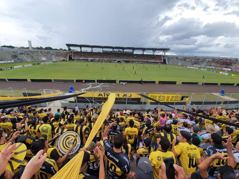 Torcida organizada (La Fúria Auri Negra) do Futebol Clube Cascavel.